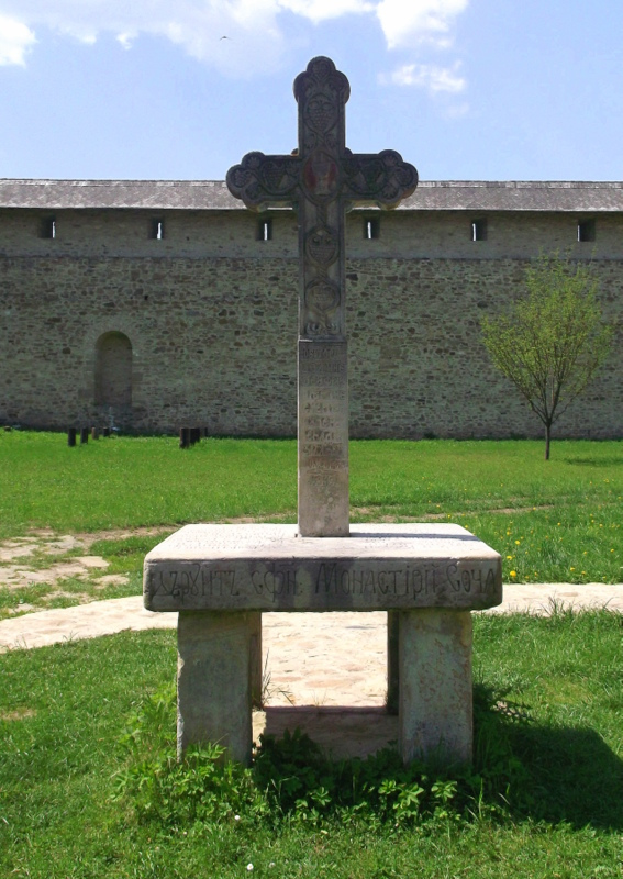 Suczawica (Sucevita), monastyr, cerkiew Zmartwychwstania 01